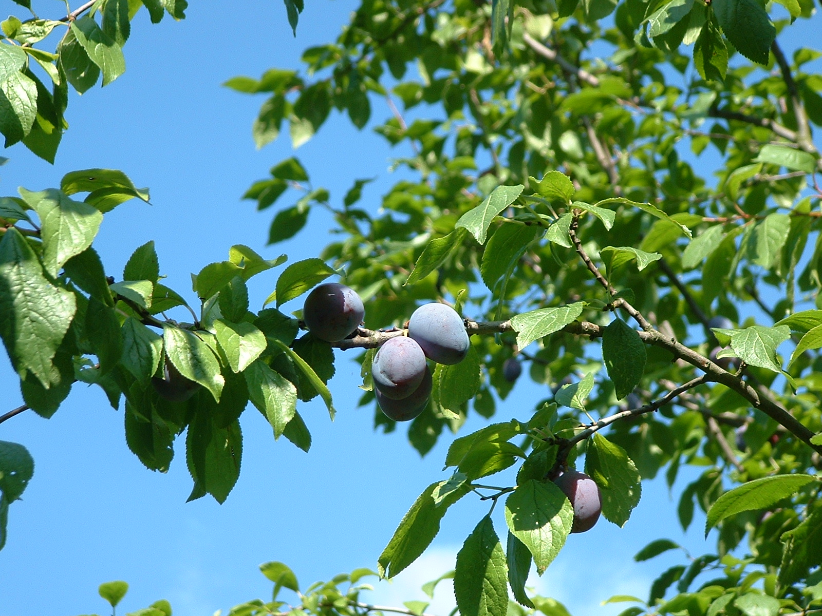 Quetsches de Lorraine sur l'arbre. Été 2002.